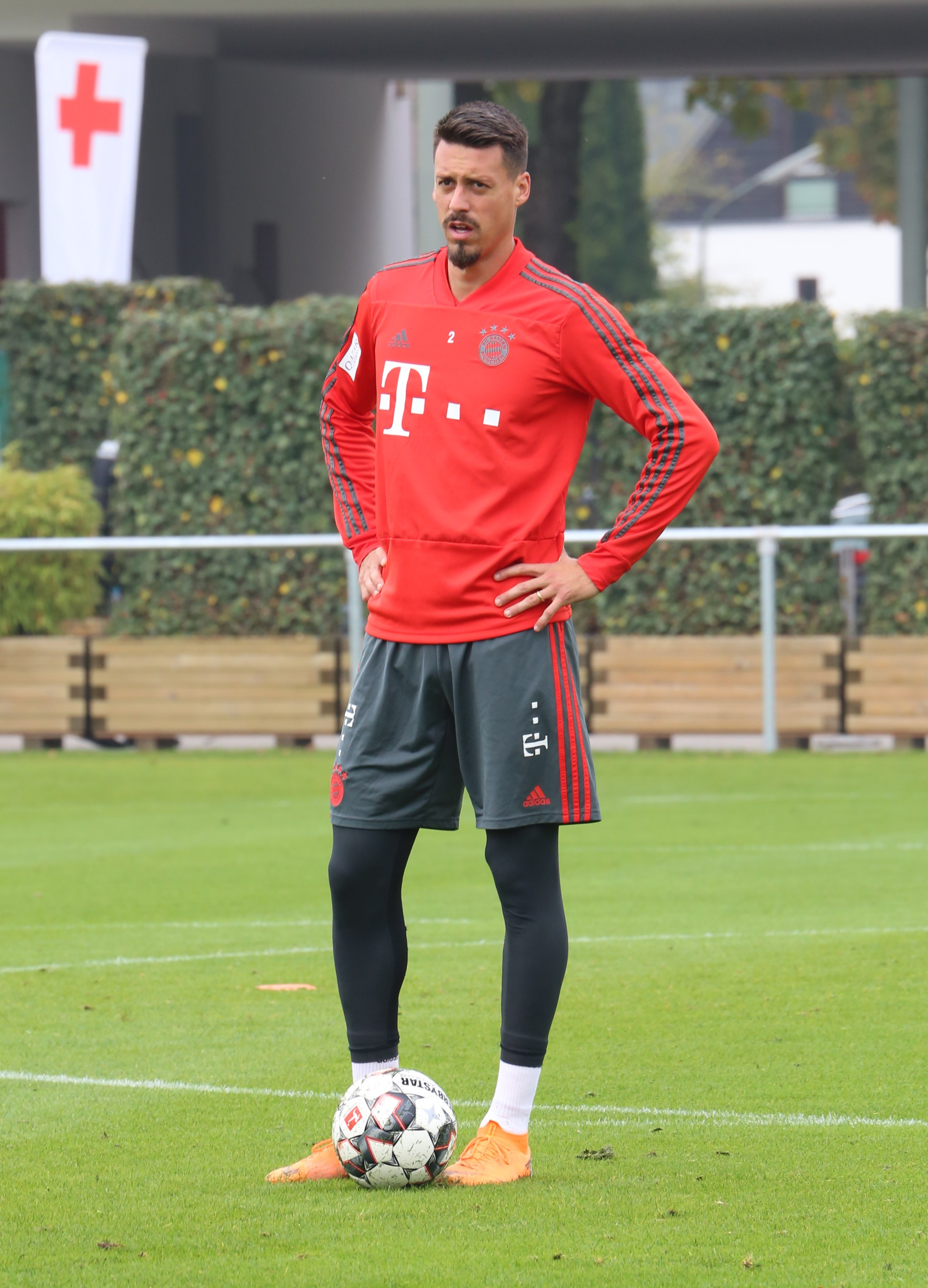 Sandro Wagner, am 9. Oktober 2018 beim Training auf dem Gelände des FC Bayern München